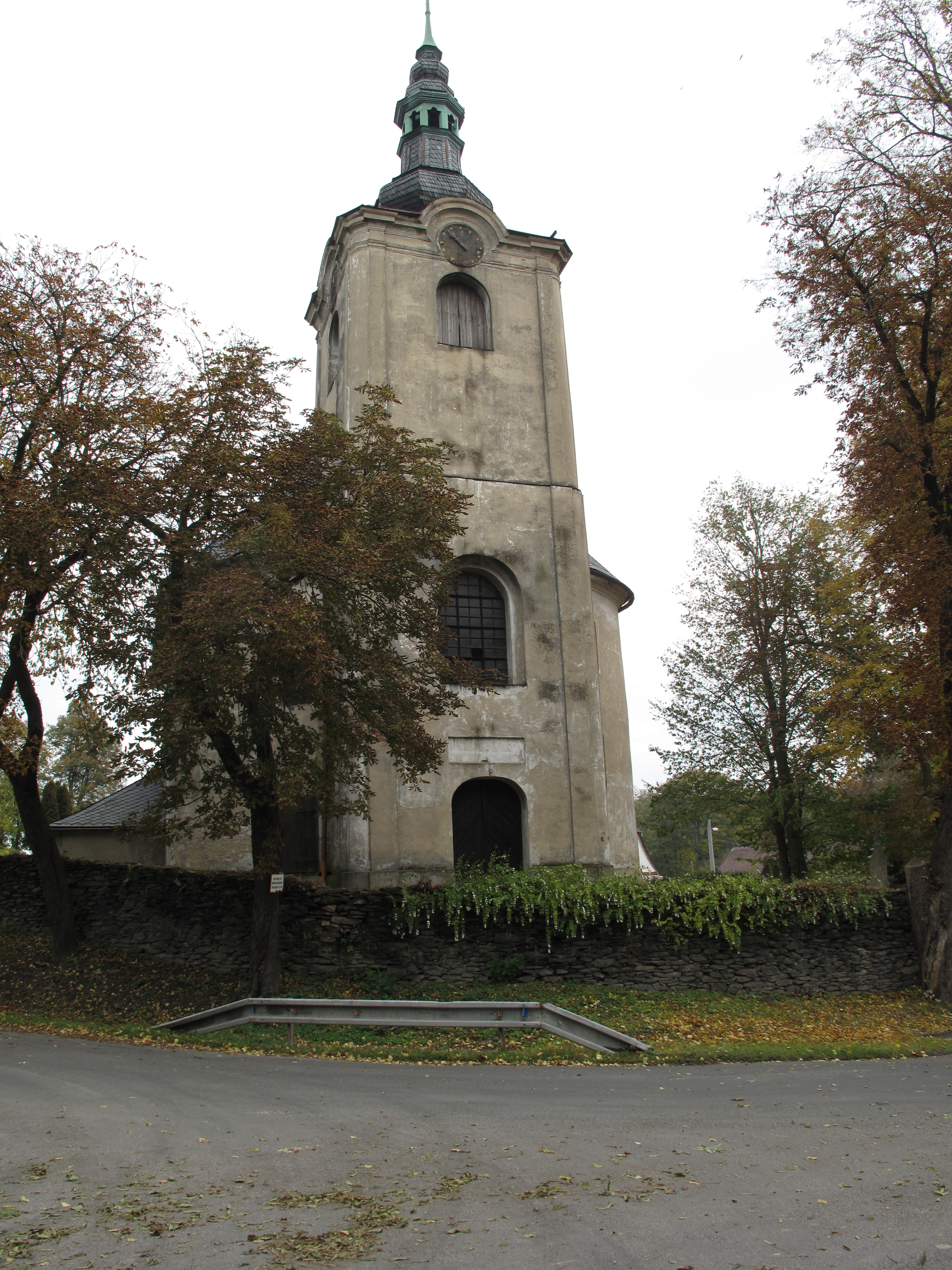 Bílčice. Okres Bruntál, Česká republika.